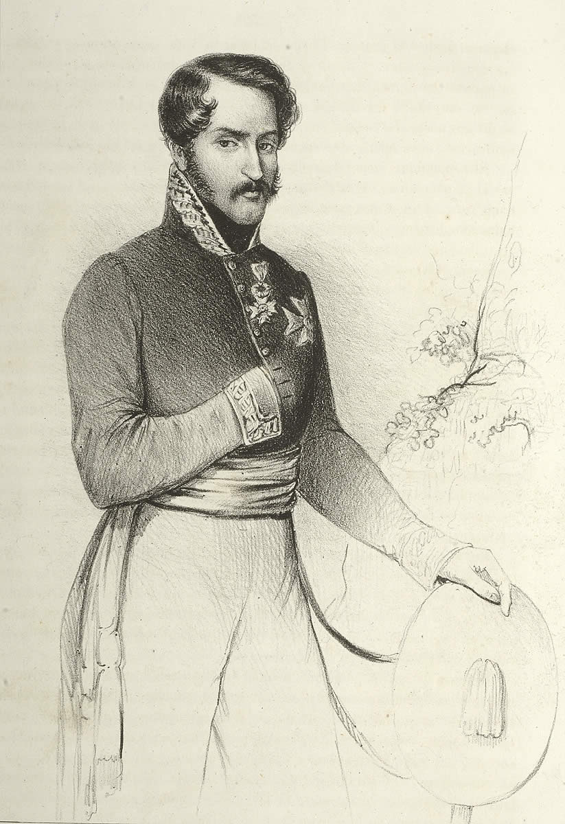 Retrato en grabado del general carlista Joaquín de Elío y Ezpeleta, recogido en el libro "Galería militar contemporánea, colección de biografías y retratos de los Generales que más celebridad han conseguido en los ejércitos liberal y carlista, durante la última guerra civil, con una descripción particular y detallada de las campañas del norte y Cataluña"